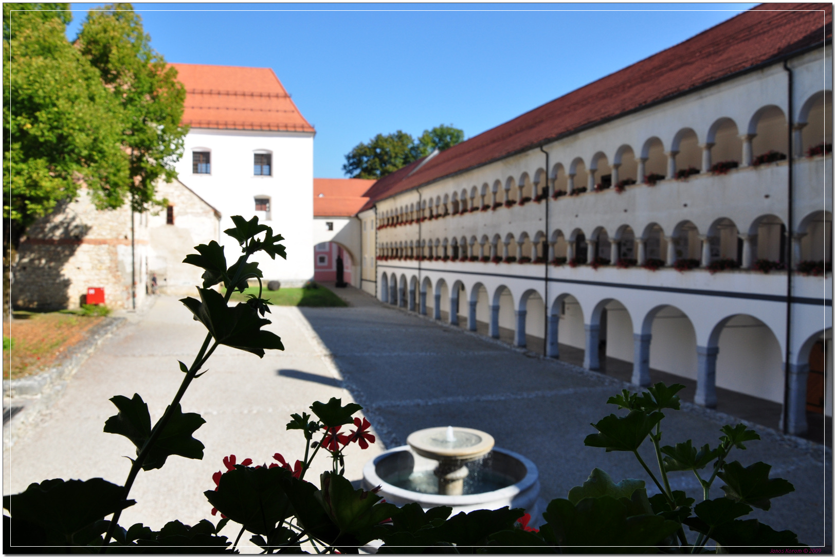 Kostanjevica (46)